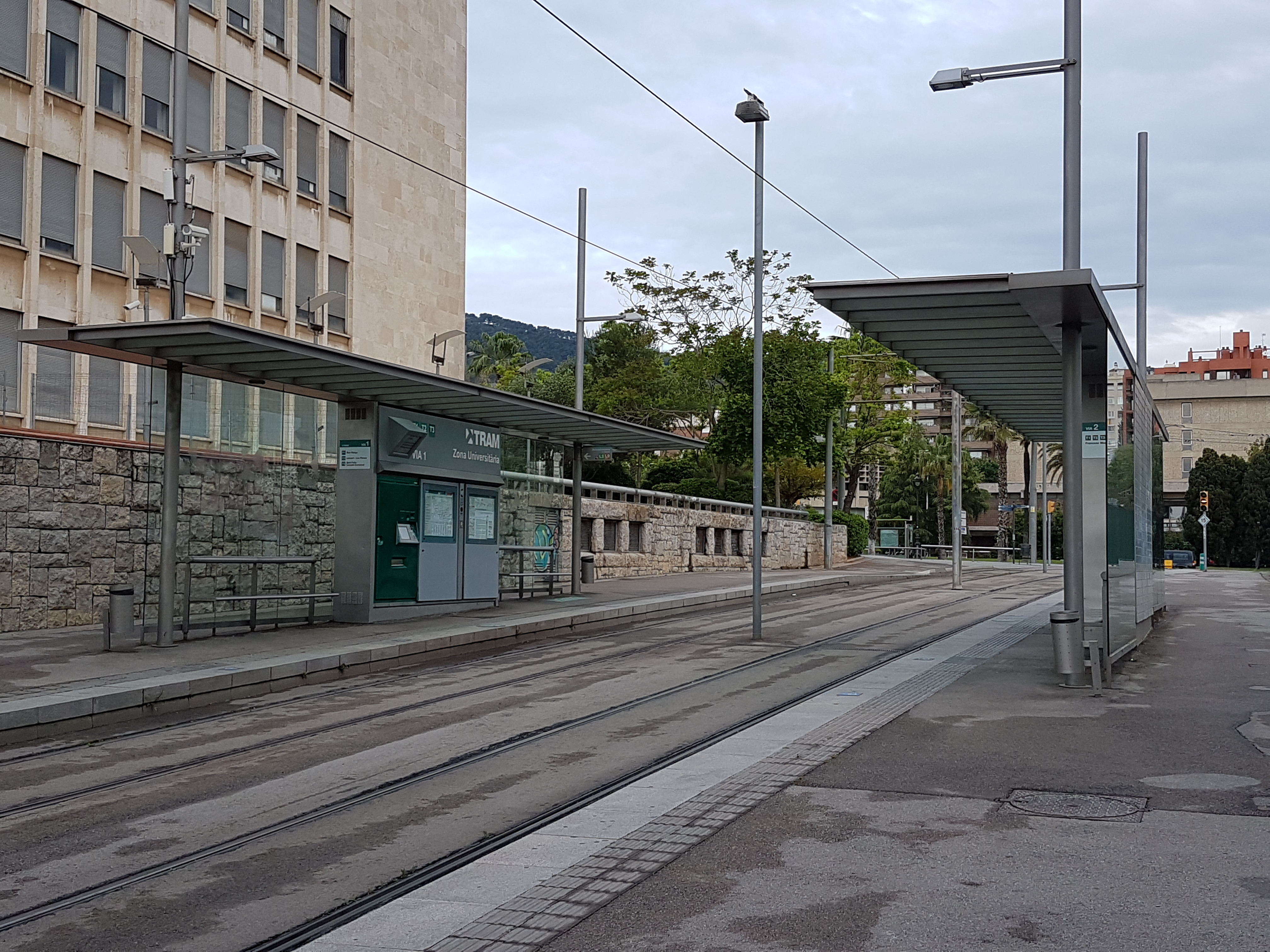 L'estació de tramvia de Zona Universitària